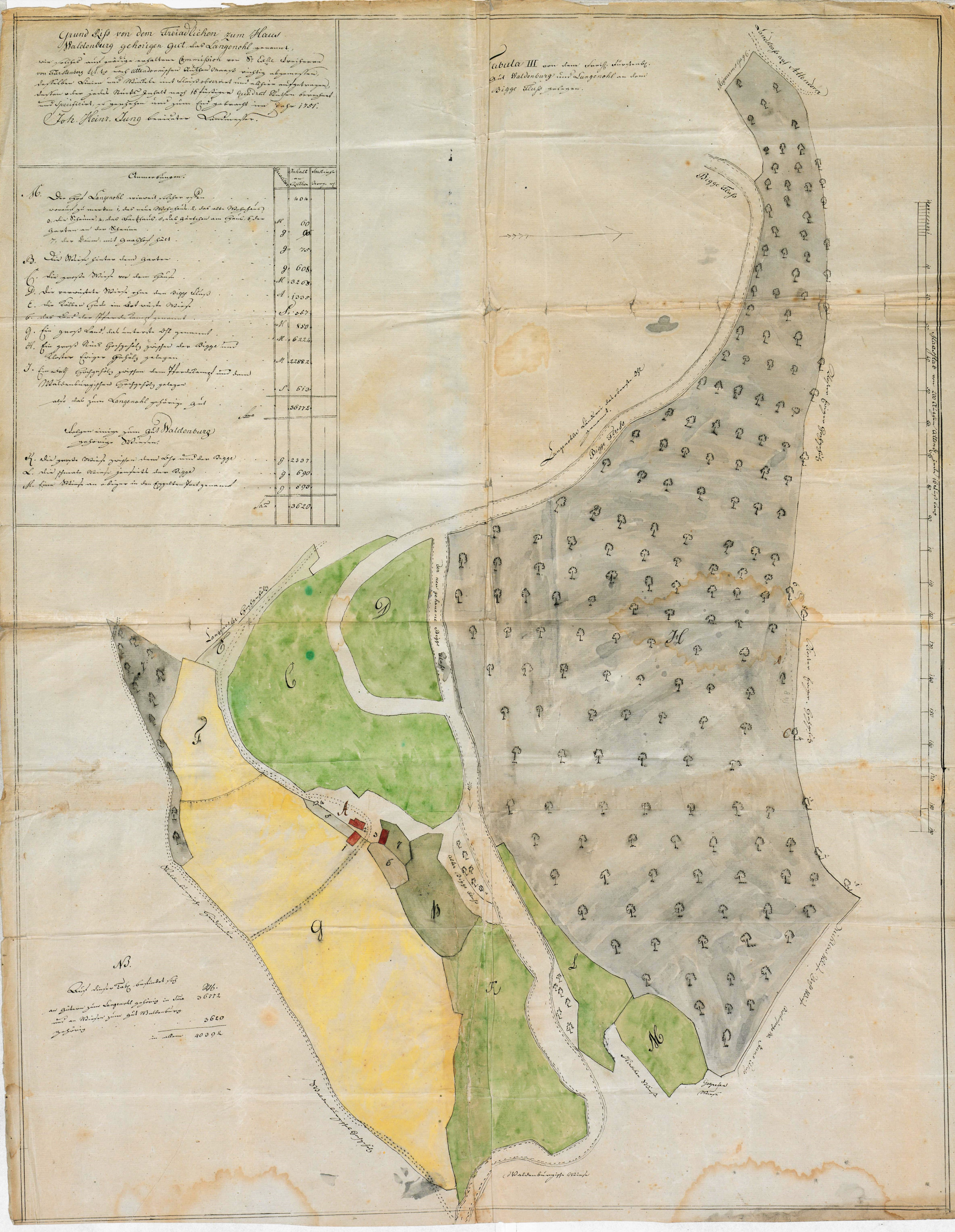 Kolorierte Zeichnung aus dem Jahre 1751 von Johann Heinrich Jung. Abgebildet sind die Ländereien des Gutes Langenohl im breiten Biggetal. Das Gut gehörte dem Haus Waldenburg (von Fürstenberg). Es hatte 1921 eine Größe von 157 ha, davon 107 ha Wald. Pächter war 1921 Heinrich Marcus. Wegen dem Bau der Biggetalsperre wurden 1961 die Gutsgebäude abgerissen.